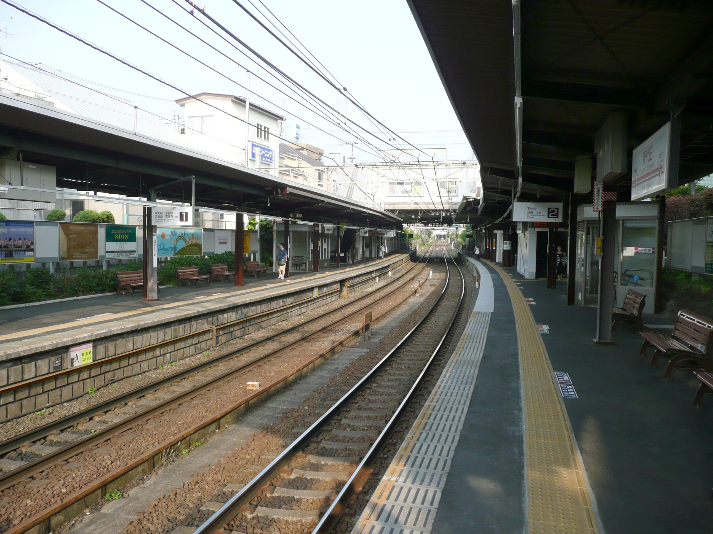 新代田駅ホーム